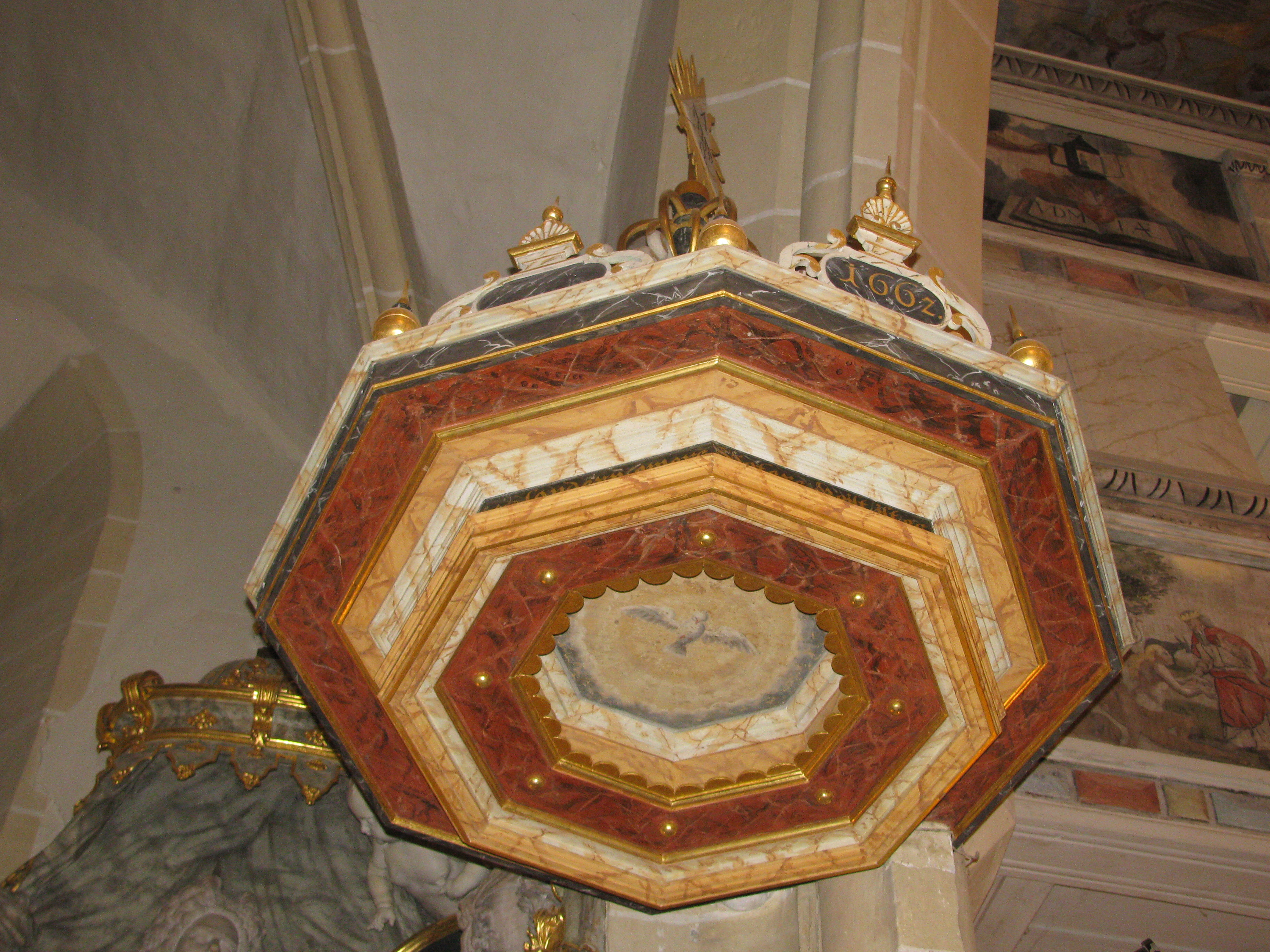 Leubnitzer Kirche, Deckel Kanzel